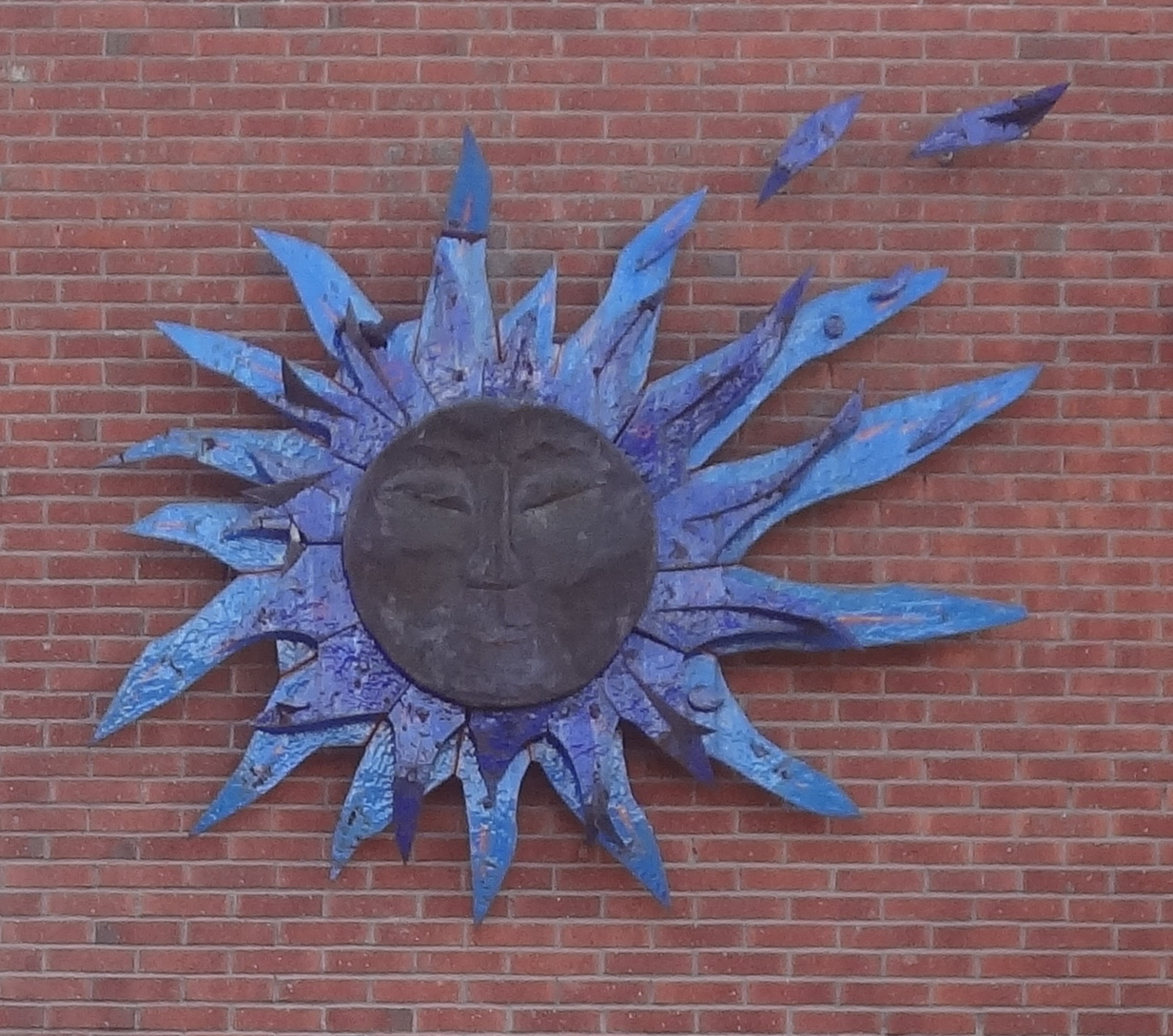 Solen av Gösta Haglund 1975, Skiftingehus skola, Eskilstuna.